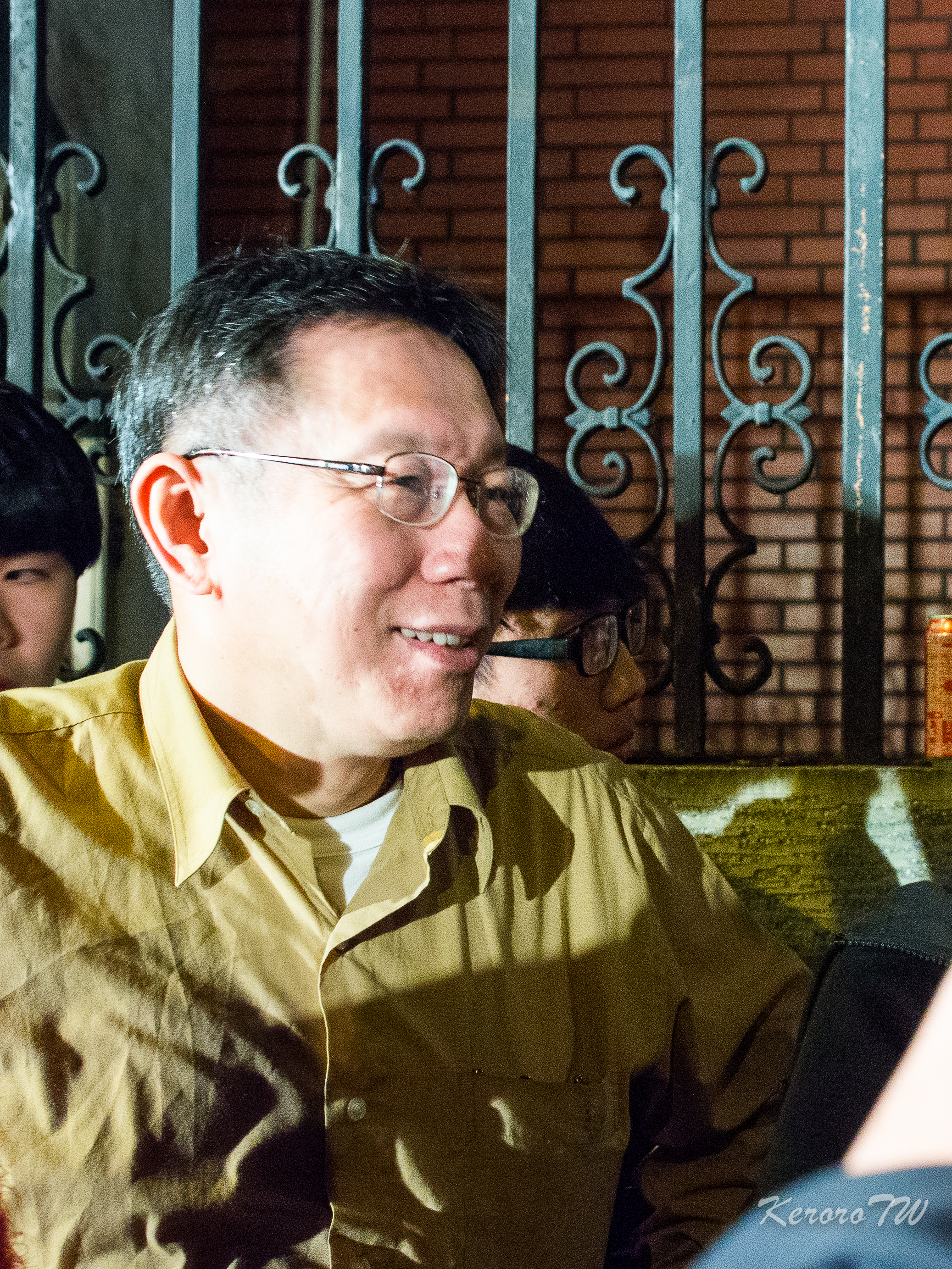 2014-03-18 反黑箱服貿